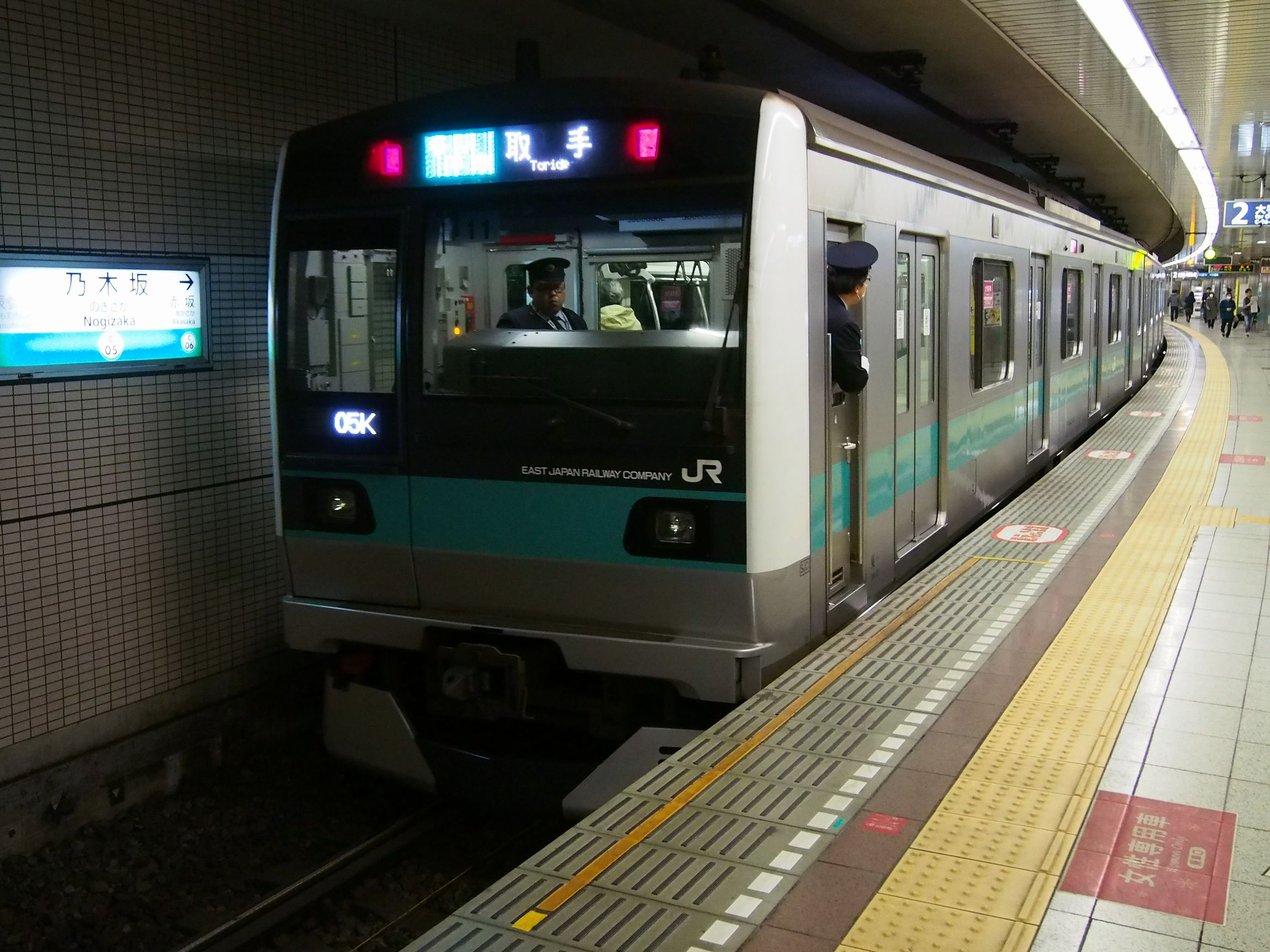 朝と夕方以降に運転されるJR常磐線直通各駅停車取手行き